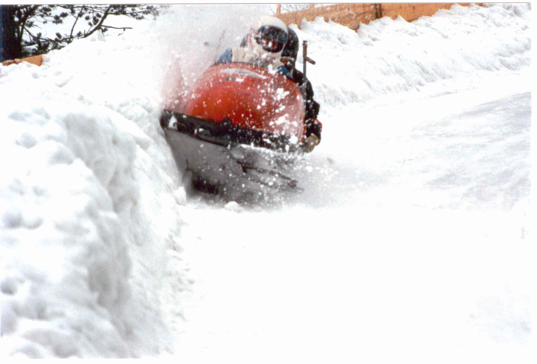 Foto della mia fototeca personale, scattata da Ivan Da Pozzo e autorizzata a circolare in rete